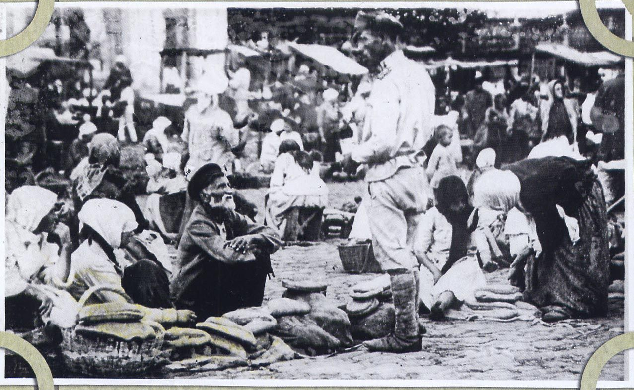 Старый Ростов-на-Дону. Базар